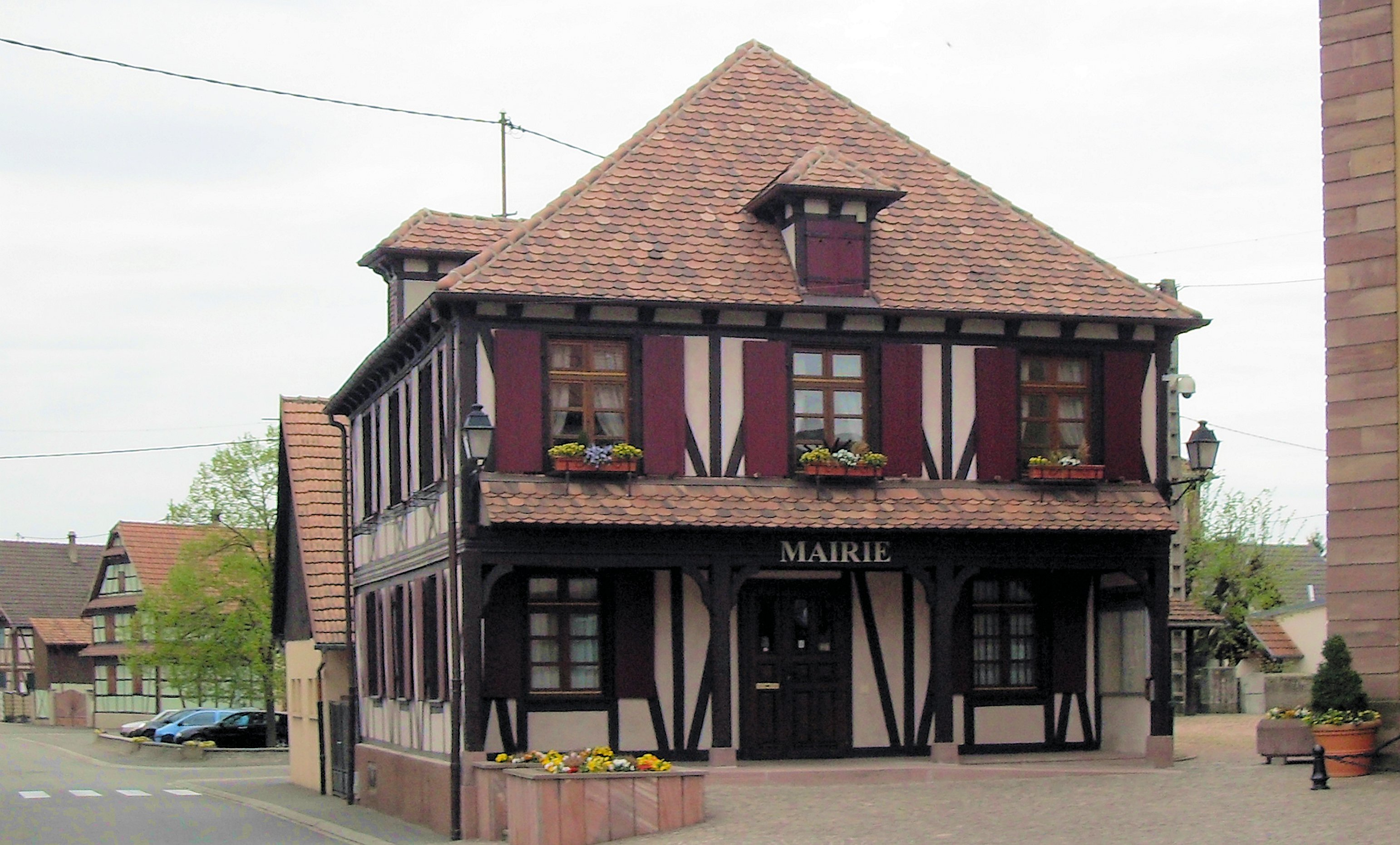 La mairie de Matzenheim, côté est